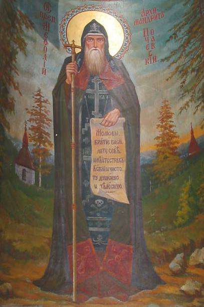 Saint Methodius of Pochayiv (1091 — † 1228), first hegumen and founder of Pochayiv monastery in western Ukraine. Мефодій Почаївський (1091, Візантія ? — † 1228, Почаїв) — древньоруський православний святий, афонський чернець, преподобний. Перший архімандрит Почаївського монастиря. За переданням, вважається засновником Почаївської Свято- Успенської лаври. Преподобний Мефодій був спершу монахом монастиря на Афоні у Греції (тоді Візантія). Згодом відправився на Русь і прожив у Почаєві багато років. Під настоятельством Мефодія на Почаївській Горі було 25 ченців пустельників. Преподобний Мефодій помер у 1228 році у віці 137 років. На його могилі був великий камінь, а на ньому напис: Зде лежить возобновитель й страж міста Святаго.